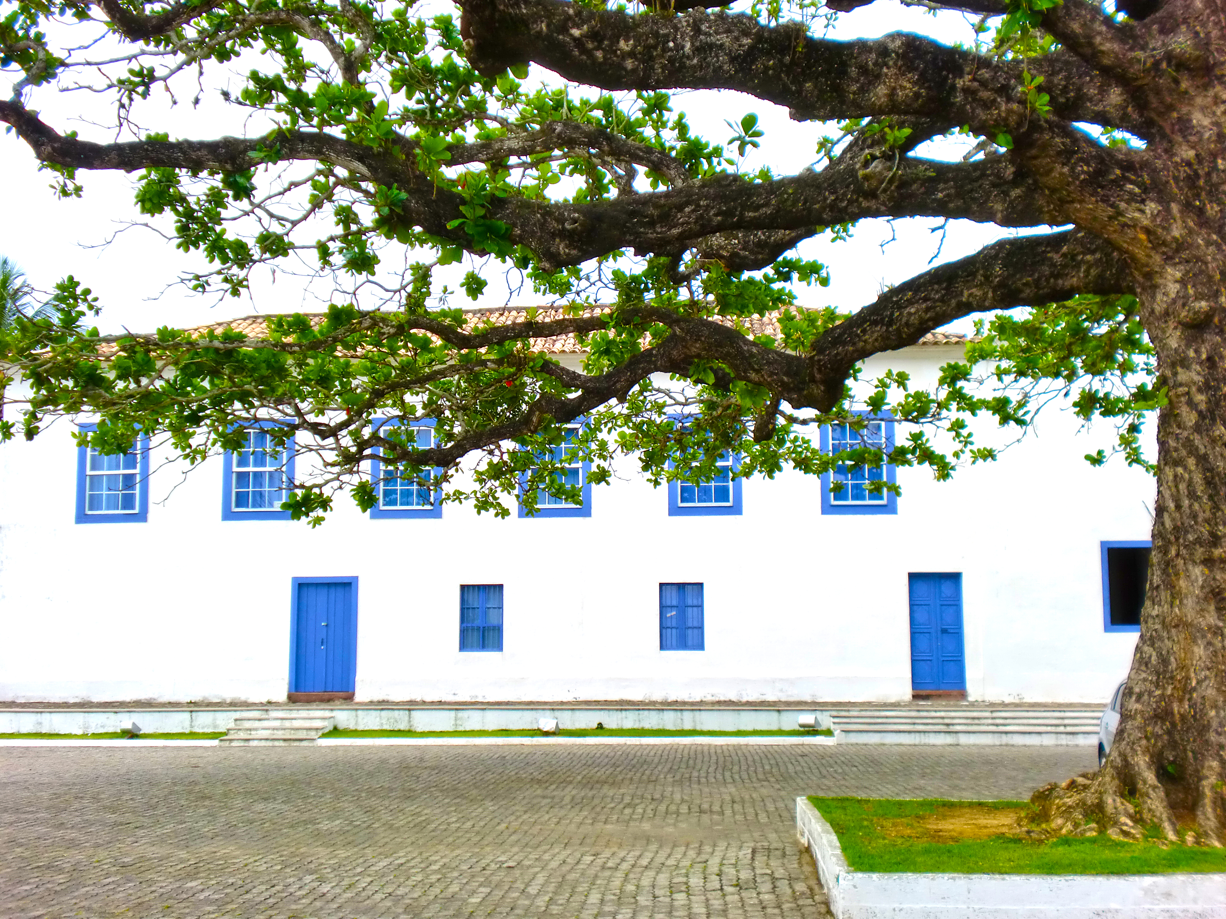 False HDR from Photoshop CS5. Igreja de Nossa Senhora da Assunção e Residência do Padre Anchieta Igreja de Anchieta - Espírito Santo.